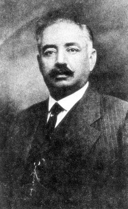 El general Jose Maria Maytorena